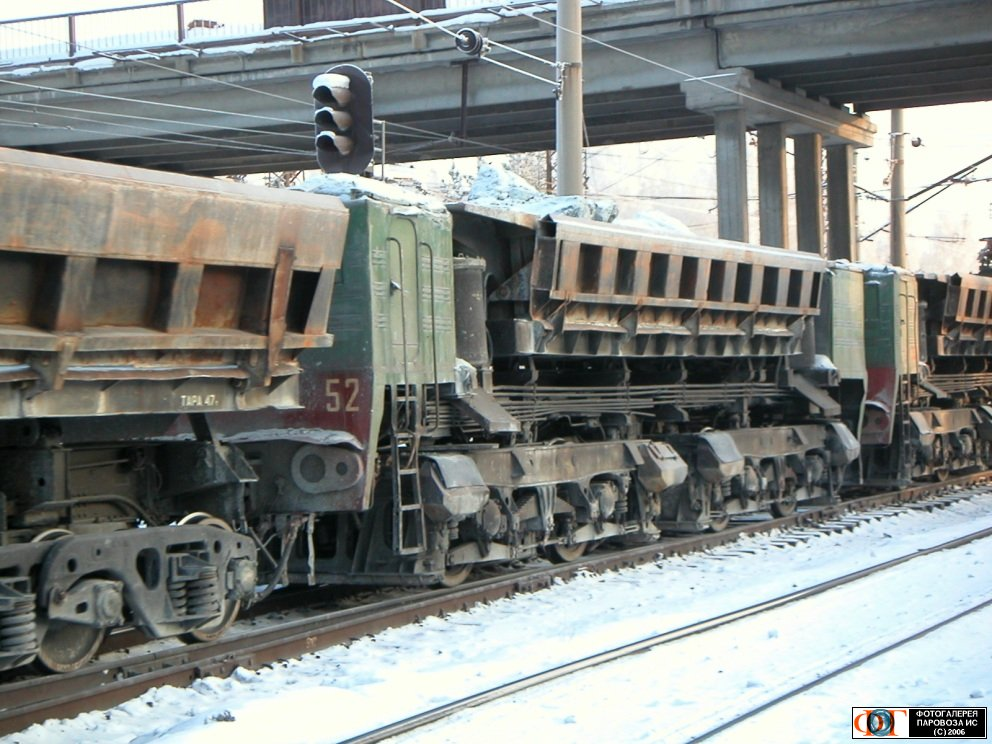 Моторный думпкар тягового агрегата ПЭ2М-257, ОАО «УралАсбест», Свердловская обл.